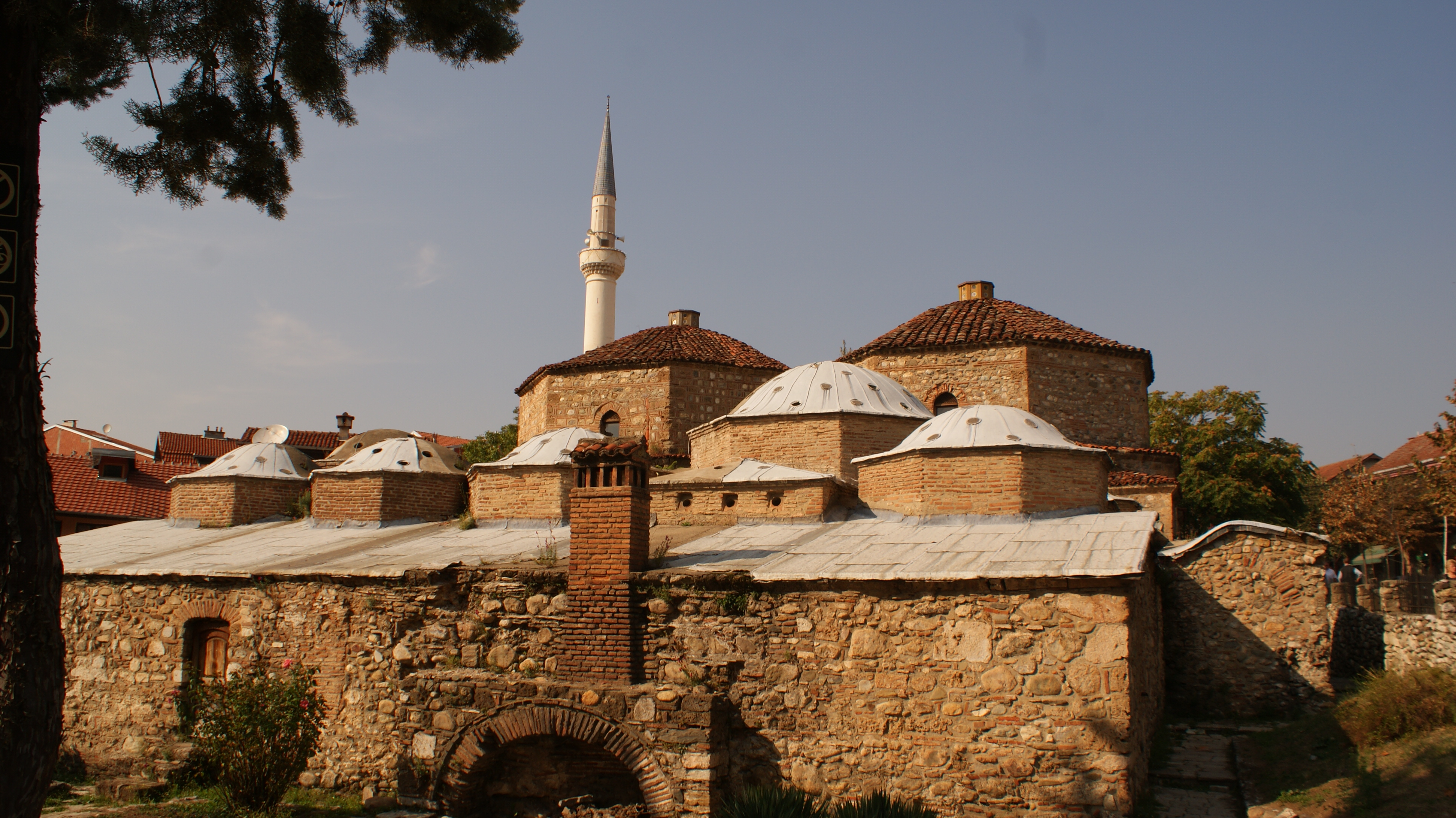 Ndërtesa e hamamit të vjetër